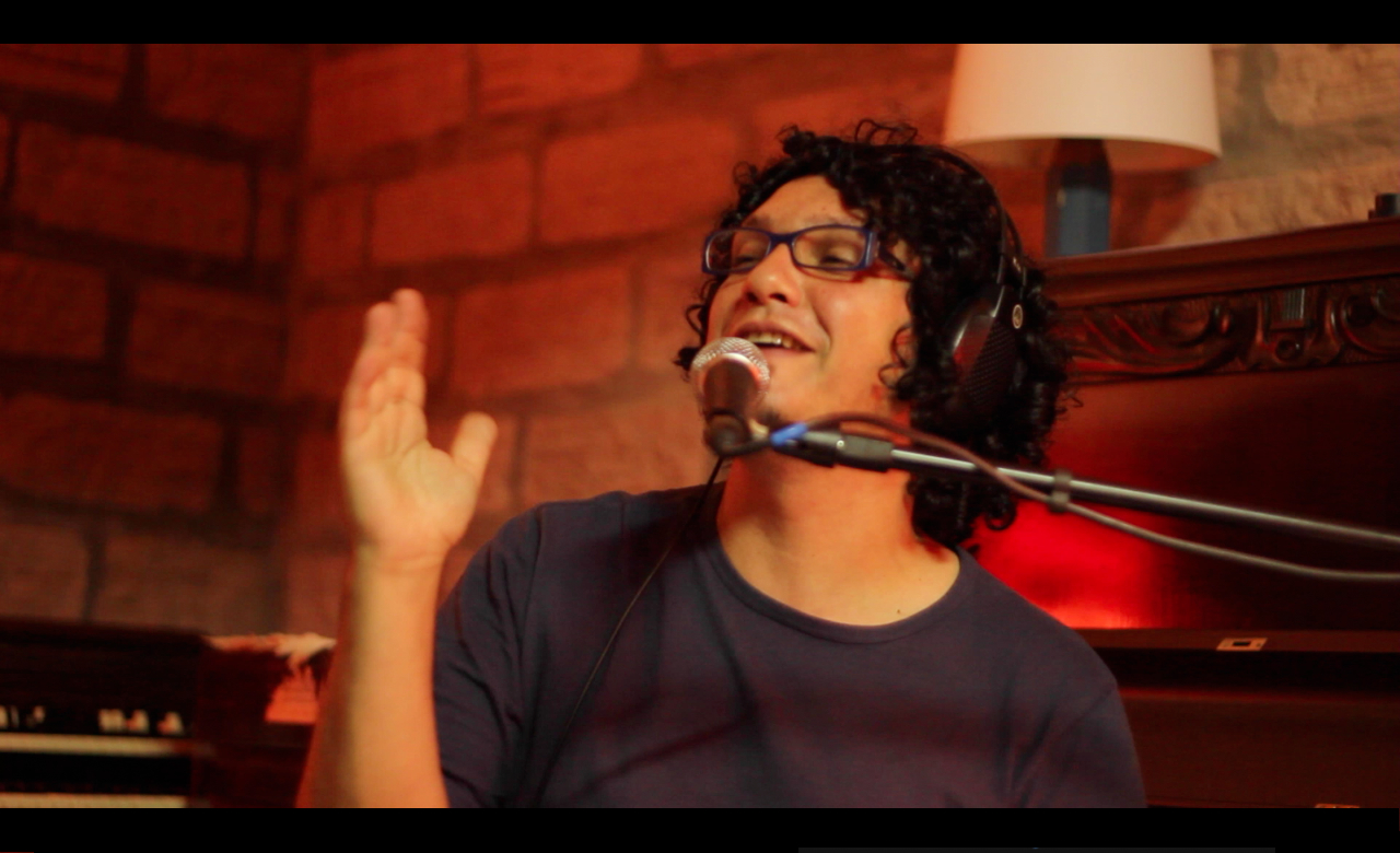 Yanto Laitano durante uma sessão de gravação no Estúdio IAPI em Porto Alegre, Rio Grande do Sul, Brasil. Instalei a câmera em um pedestal, filmei e depois fotografei a tela.